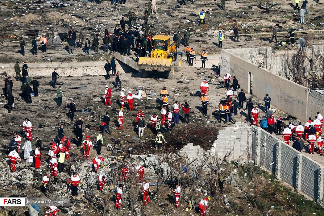 سقوط هواپیمای اوکراینی بوئینگ ۷۳۷–۸۰۰ بین شهرهای پرند و شهریار در استان تهران